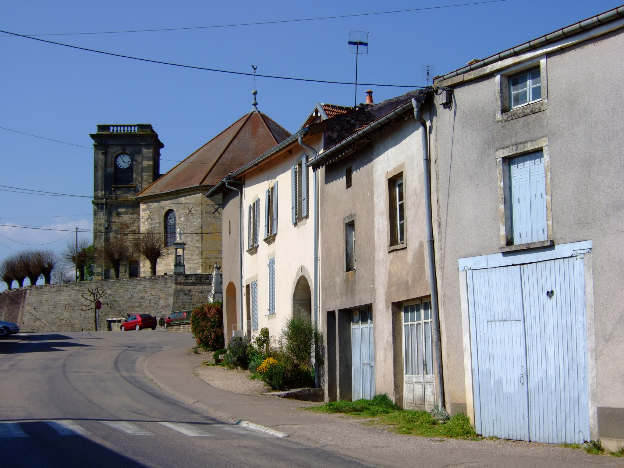 Blondefontaine